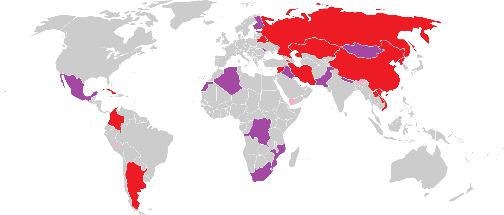 Axis of Resistance map